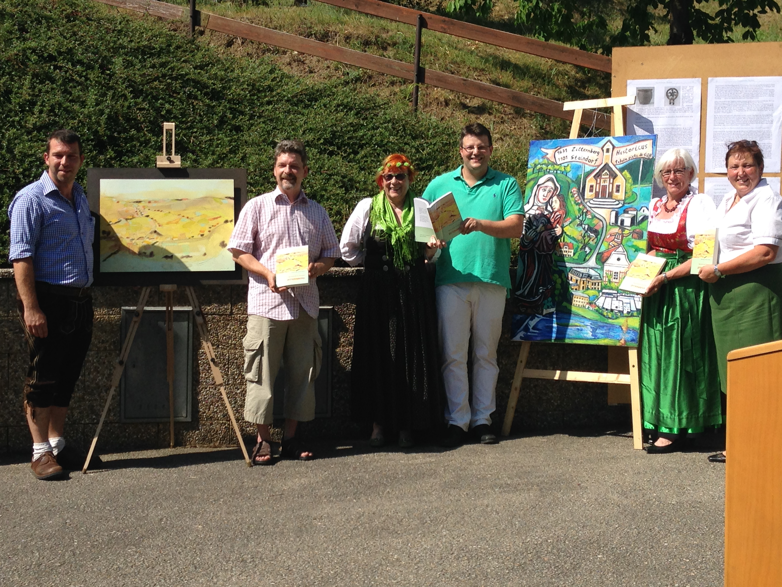 Präsentation des Heimatbuches, der Ortschronik "Spurensuche im Kamptal. Zitternberg". 24. Juni 2017, Zitternberg, Gars am Kamp Personen von links nach rechts. Bernhard Grünsteidl (Verschönerungsverein Zitternberg), Künstler Savio Verra, Christine Steininger (Verschönerungsverein Zitternberg), Künstler Matthias Laurenz Gräff, Susanna Jungwirth (Verschönerungsverein Zitternberg), Dame (Verschönerungsverein Zitternberg)